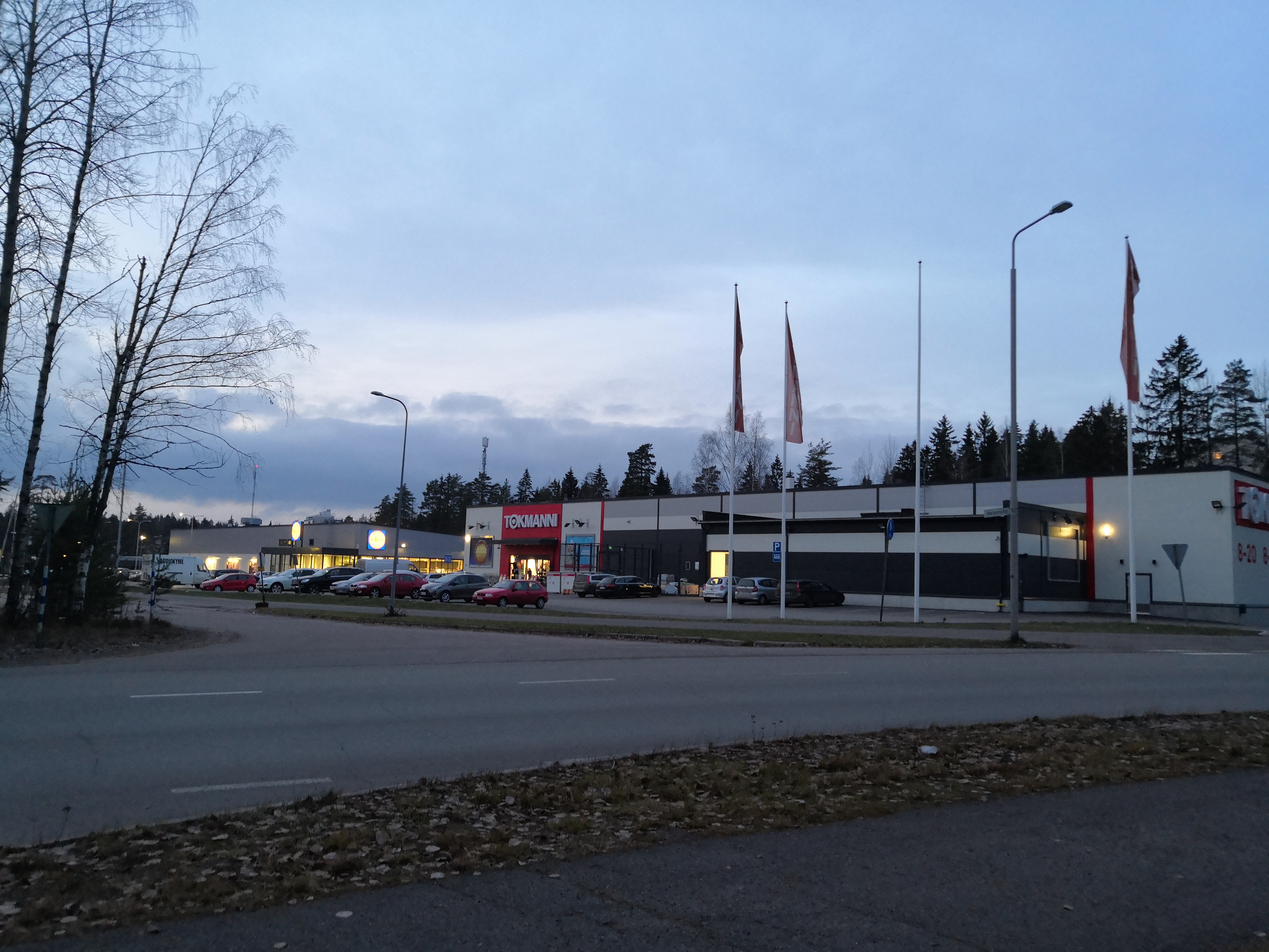 Palokankaan Harjutien liikekeskus (Lidl ja Tokmanni) Kouvolassa